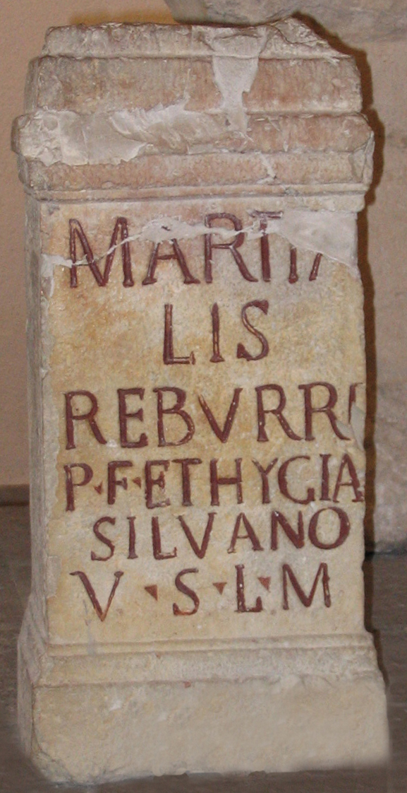 Ara votiva al dio Silvano, I sec. d.C., ritrovata nel territorio di Lemine (Almenno), BG, ex Museo archeologico di Bergamo. CIL V 5118.